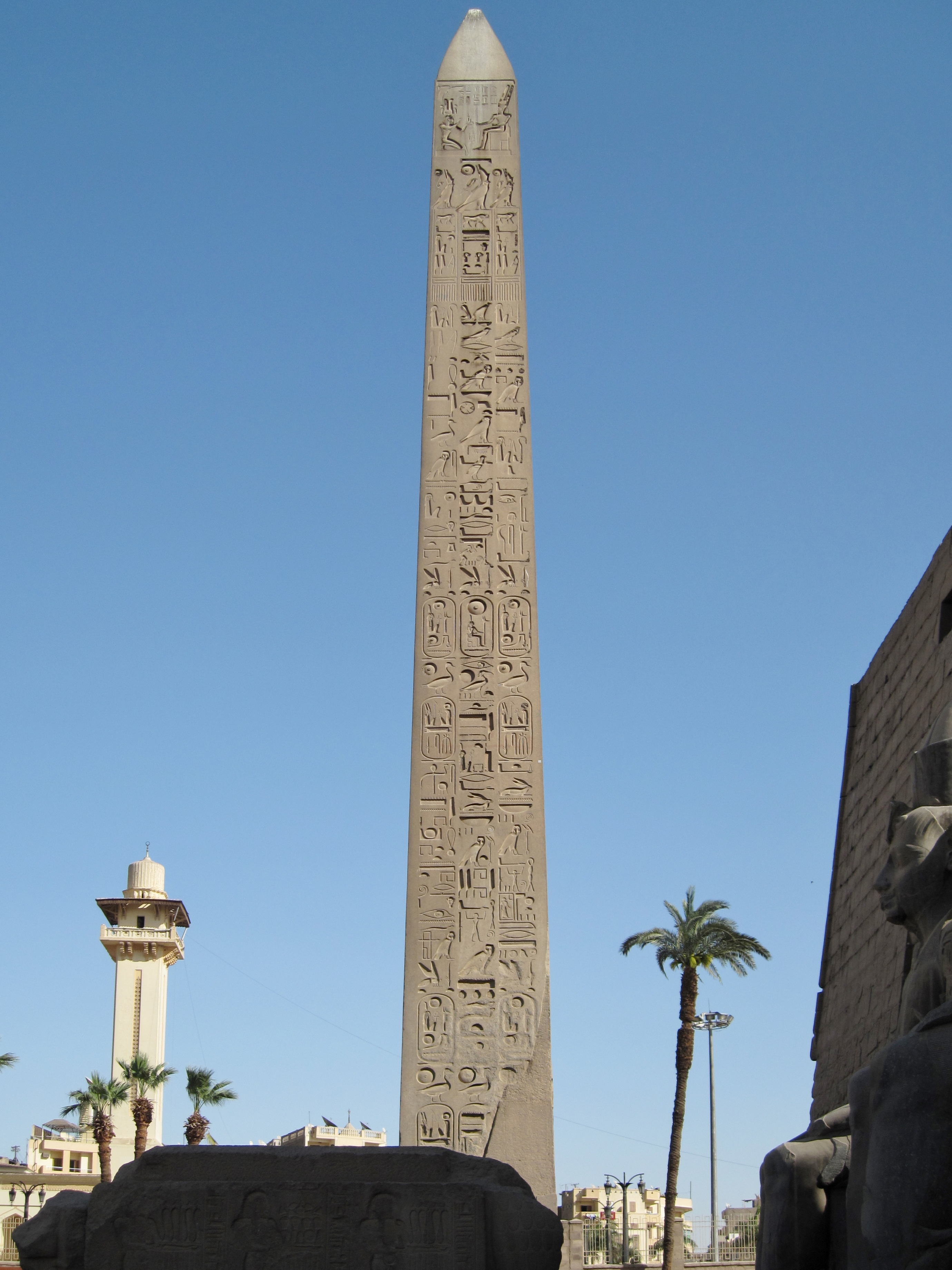 Obelisk am Eingang des Luxor-Tempels, Ägypten